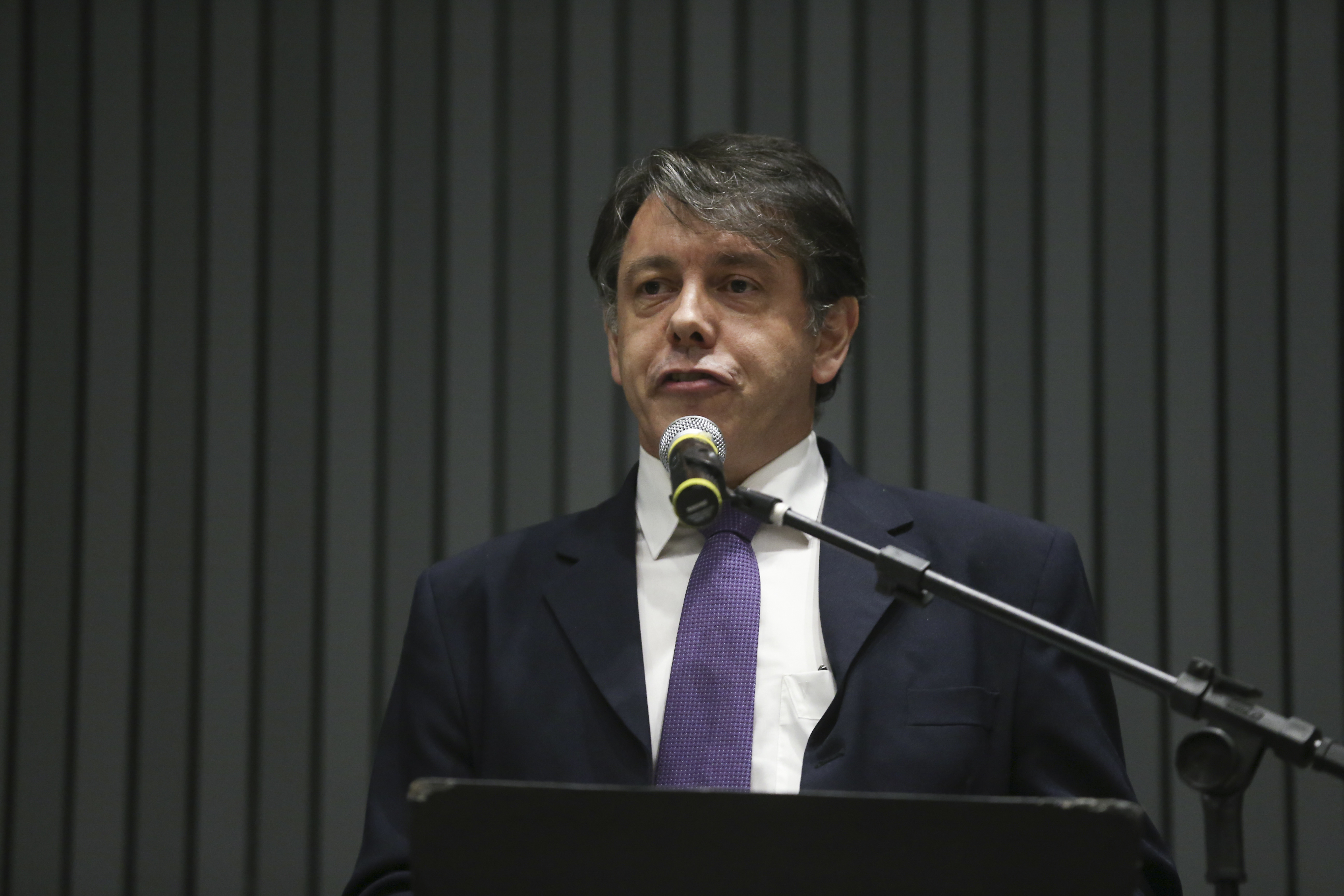 Brasília - O Diretor do Instituto de Matemática Pura, Marcelo Viana fala durante homenagem a alunos da rede pública de ensino do DF premiados na Olimpíada Brasileira de Matemática (Elza Fiuza/ Agência Brasil)